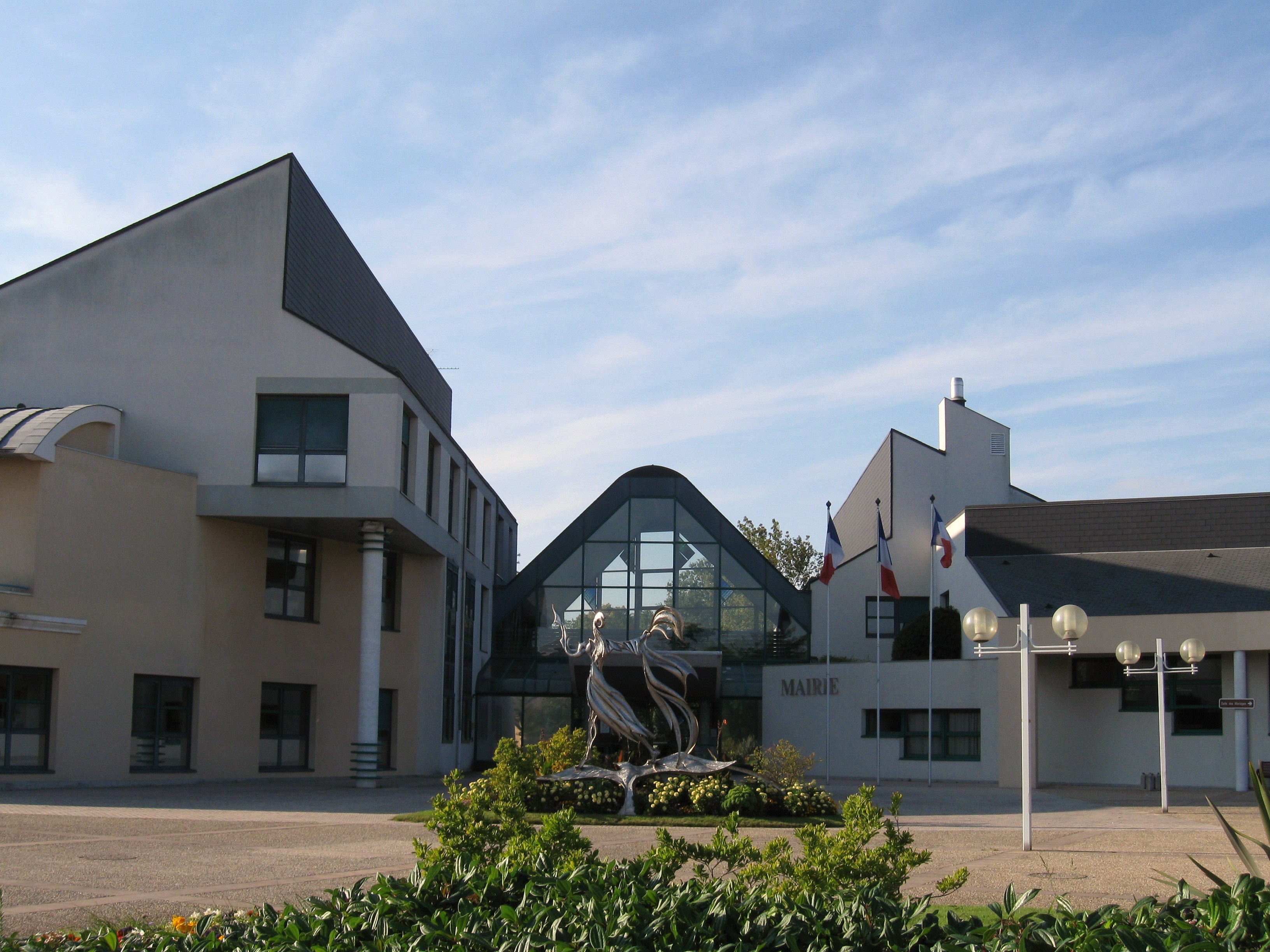 La mairie de Saran, Loiret, France